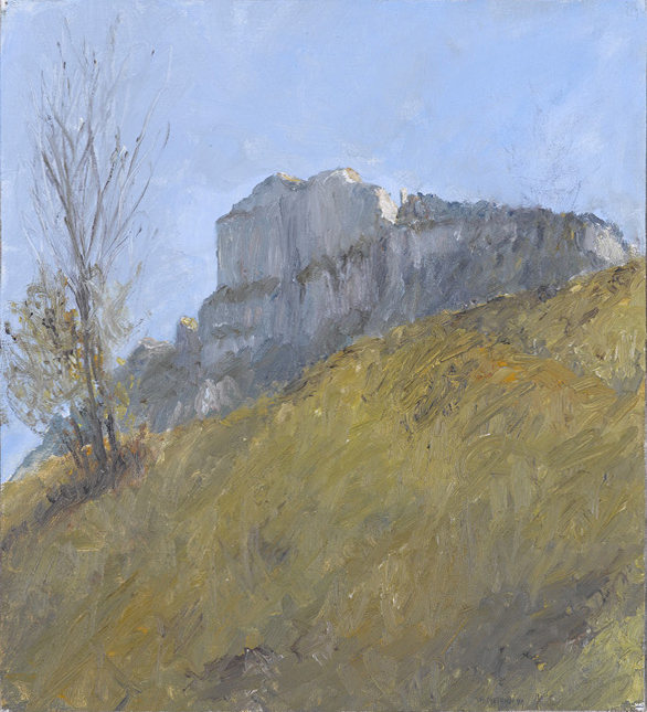 Hubert Dietrich (1930–2006): Kanisfluh mit Gschwind II, Öl auf Leinwand, 44x40cm, 1997, Privatbesitz.